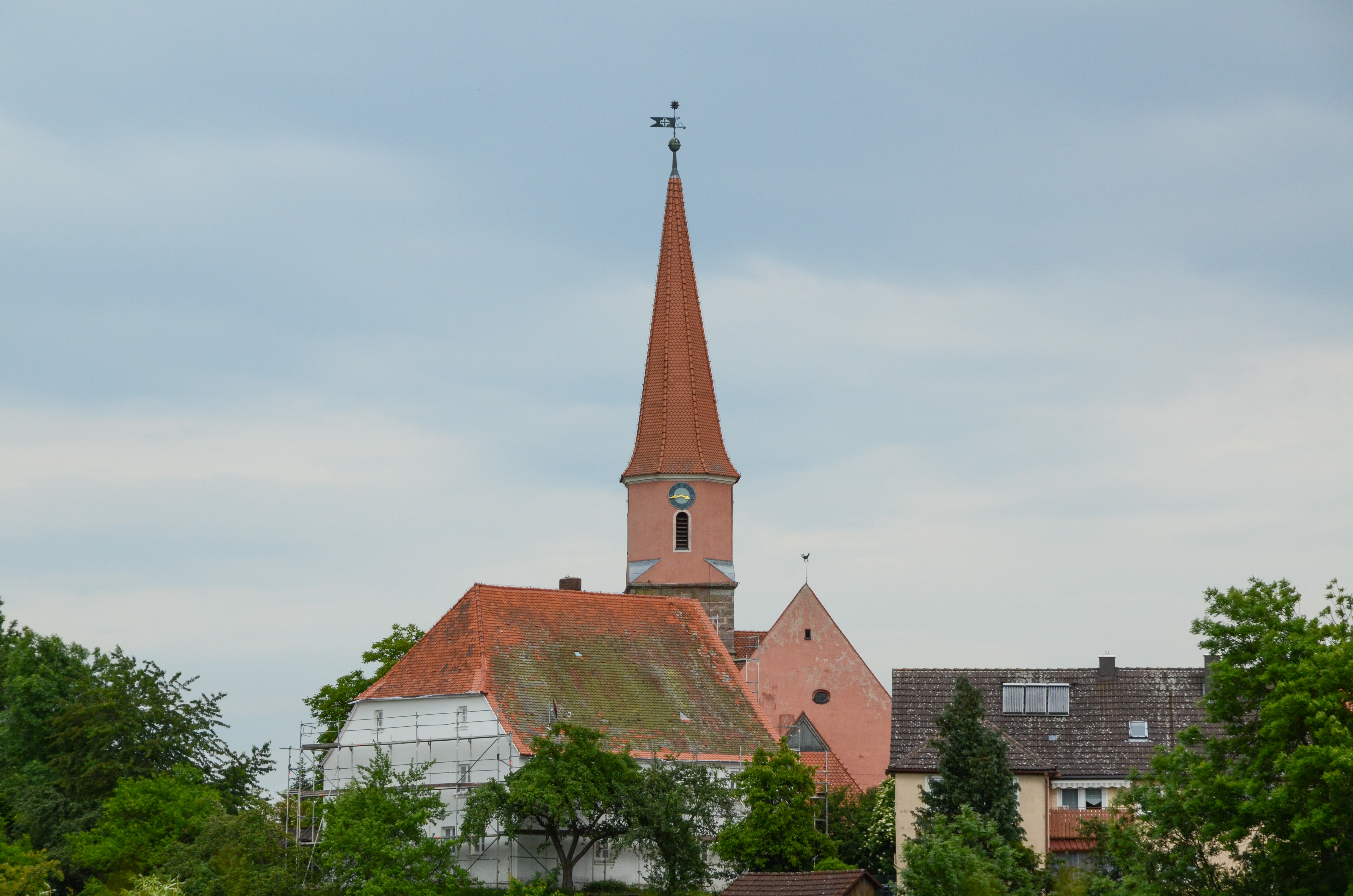 Burk Evangelische Kirche